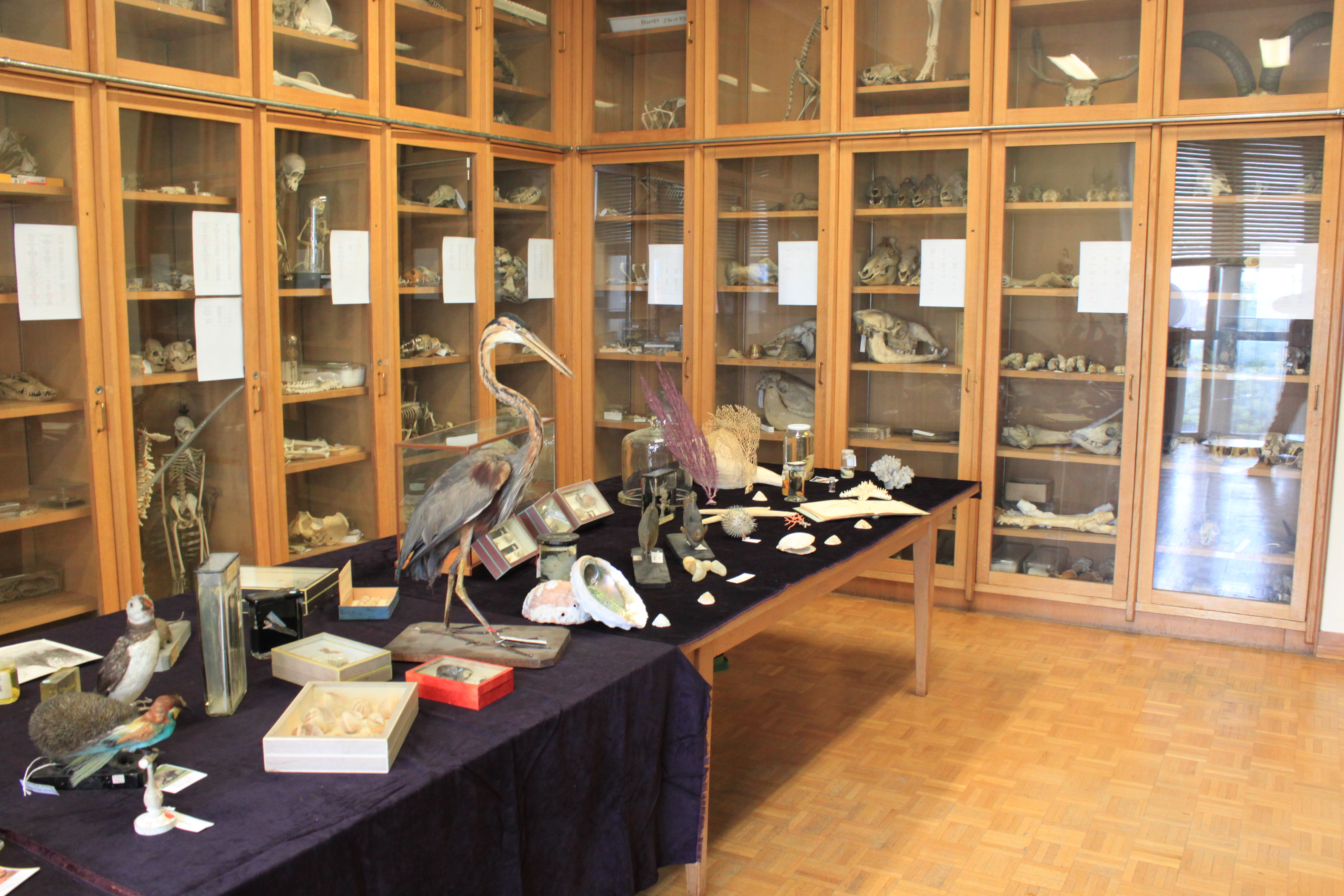 Collections scientifiques de l'Université de Bourgogne, Dijon, France